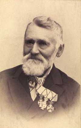 Carl Berg (20.jun.1812-12.jan.1895), skolemand, rektor på Frederiksborg Lærde Skole, forfatter af oldgræsk-dansk ordbog.